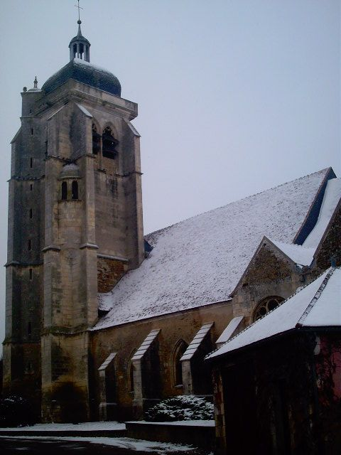 L'église de Chevannes (Yonne), datant du XVIe siècle.